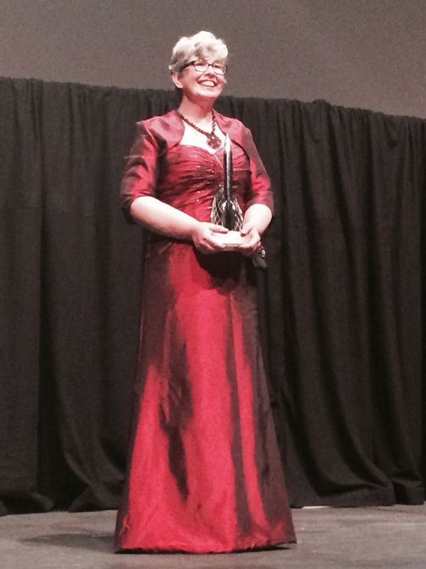 אן לקי זוכת פרס הוגו 2014